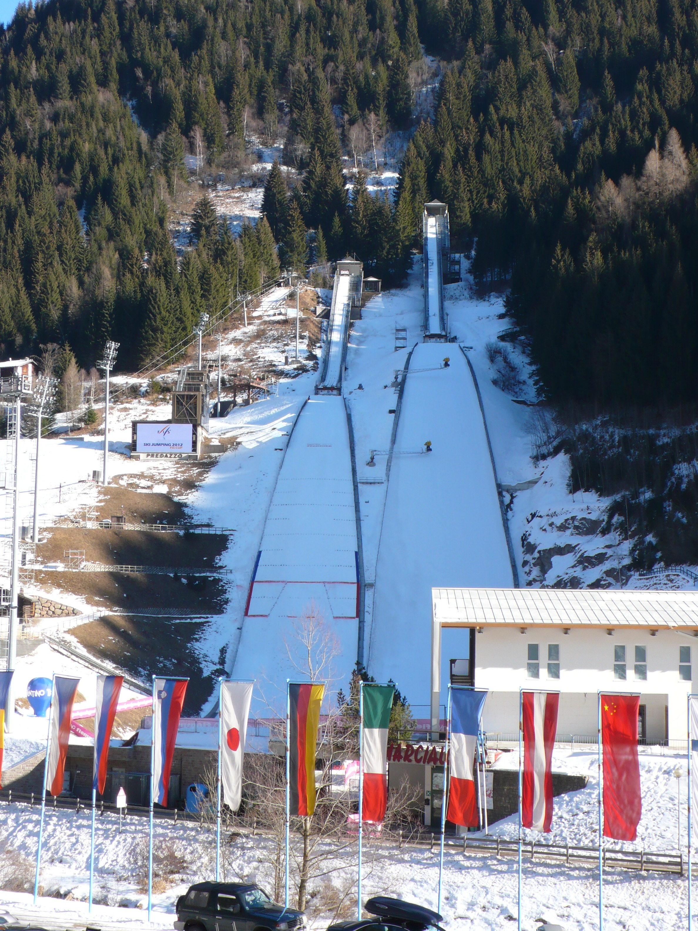 Gli Trampolini Giuseppe Dal Ben di Predazzo